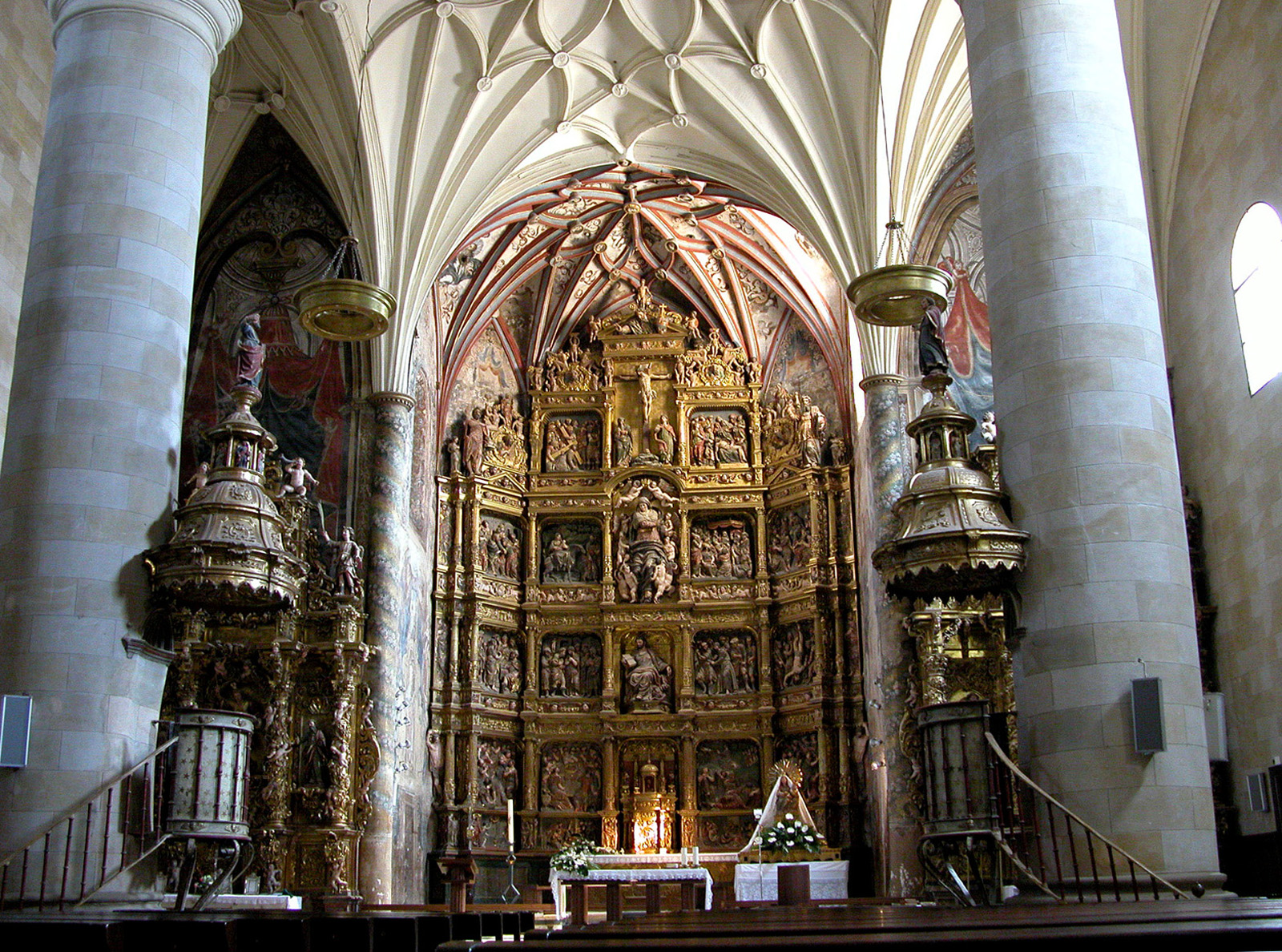 Retablo de la iglesia de San Bartolomé, Aldeanueva de Ebro, La Rioja, España.